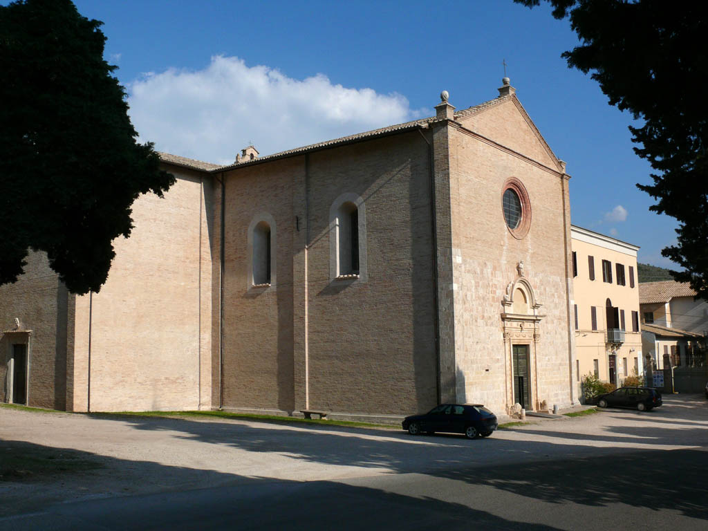 Chiesa della Madonna delle Lacrime, Trevi (PG)